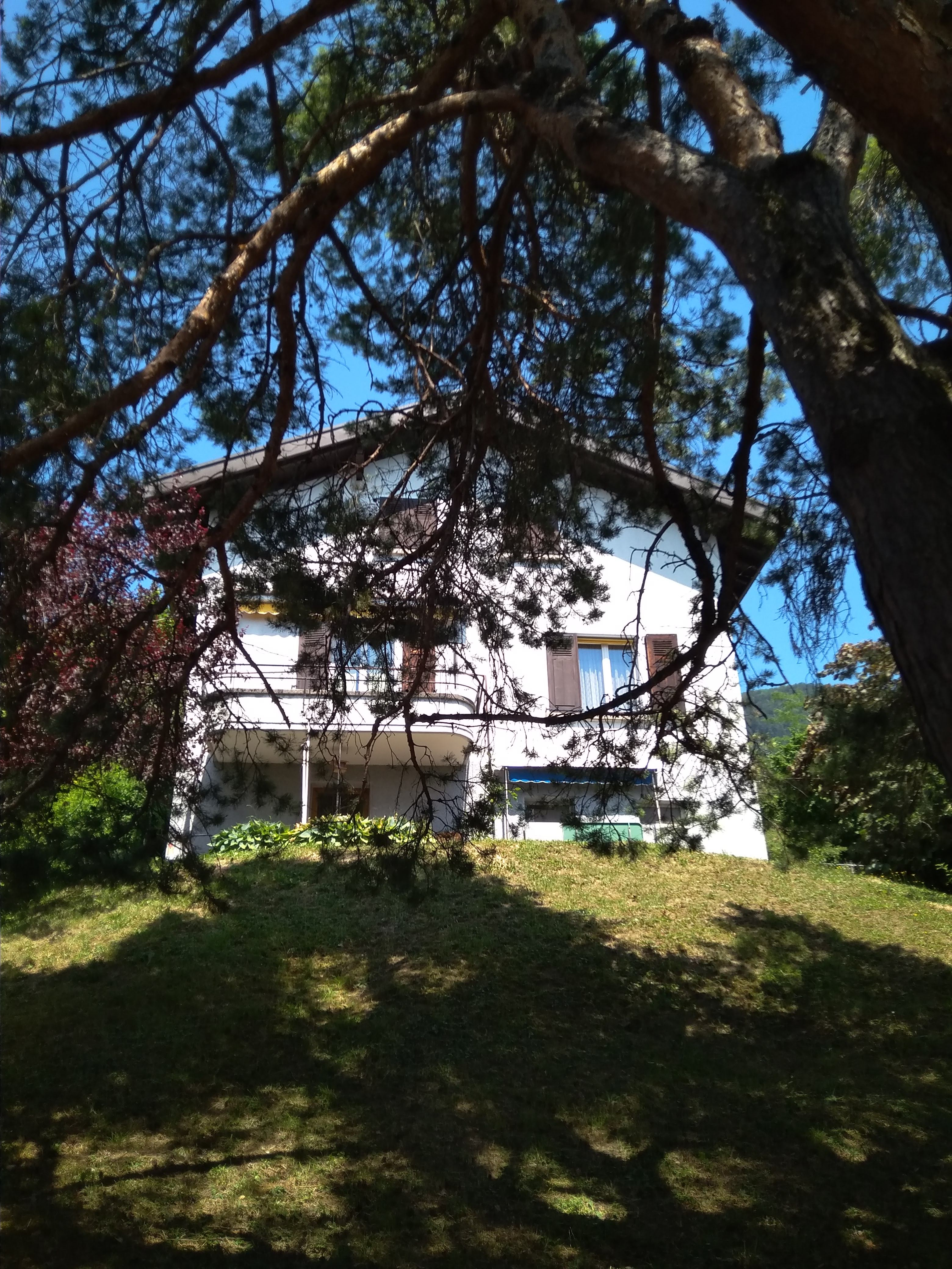 В этом здании много лет была Ешива Эц Хаим, потом переехала в Израиль